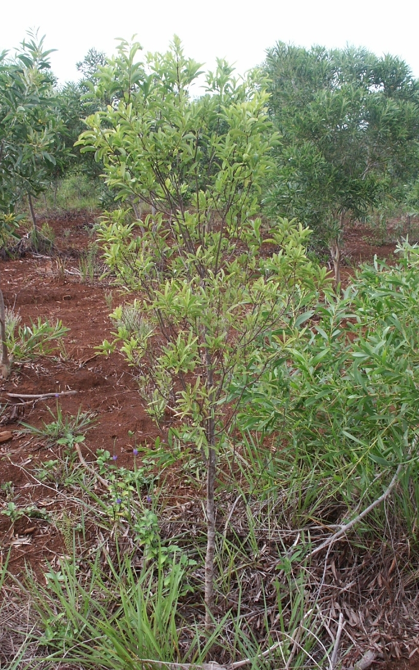 Santalum austrocaledonicum de trois ans. Ile des Pins - Nouvelle-Calédonie - Province Sud